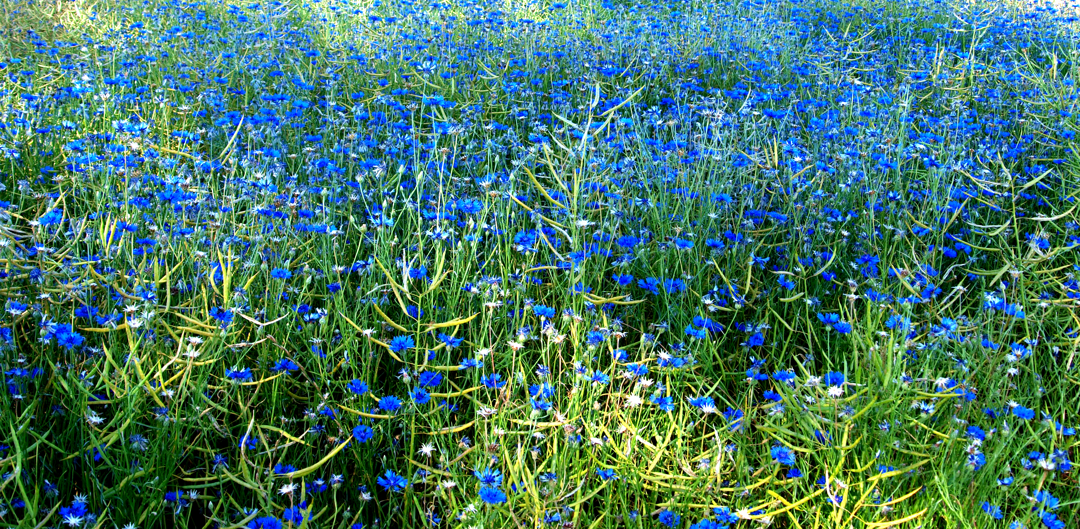 Kornblumen am Feldrand